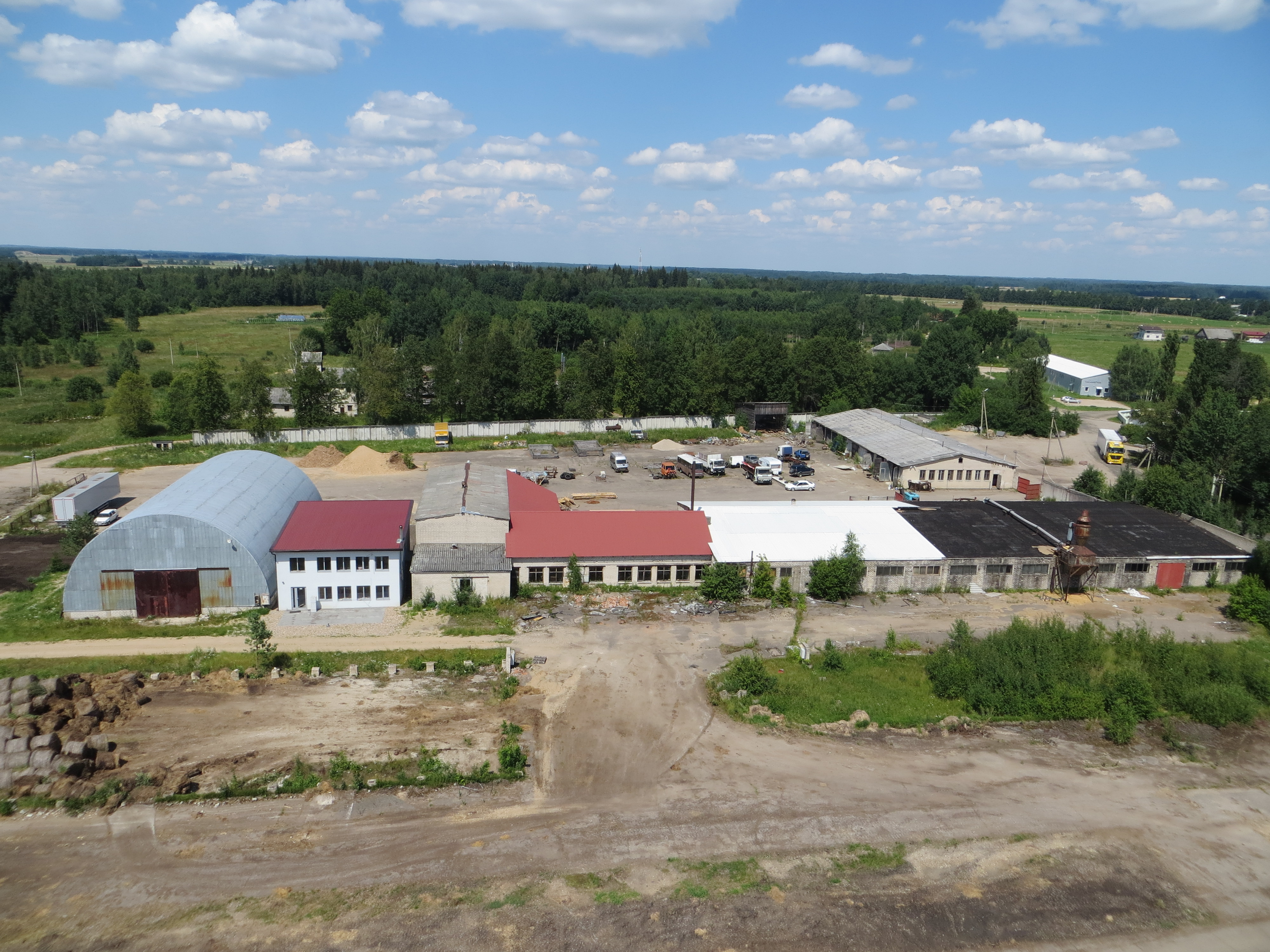 Juodeliai 19131, Lithuania